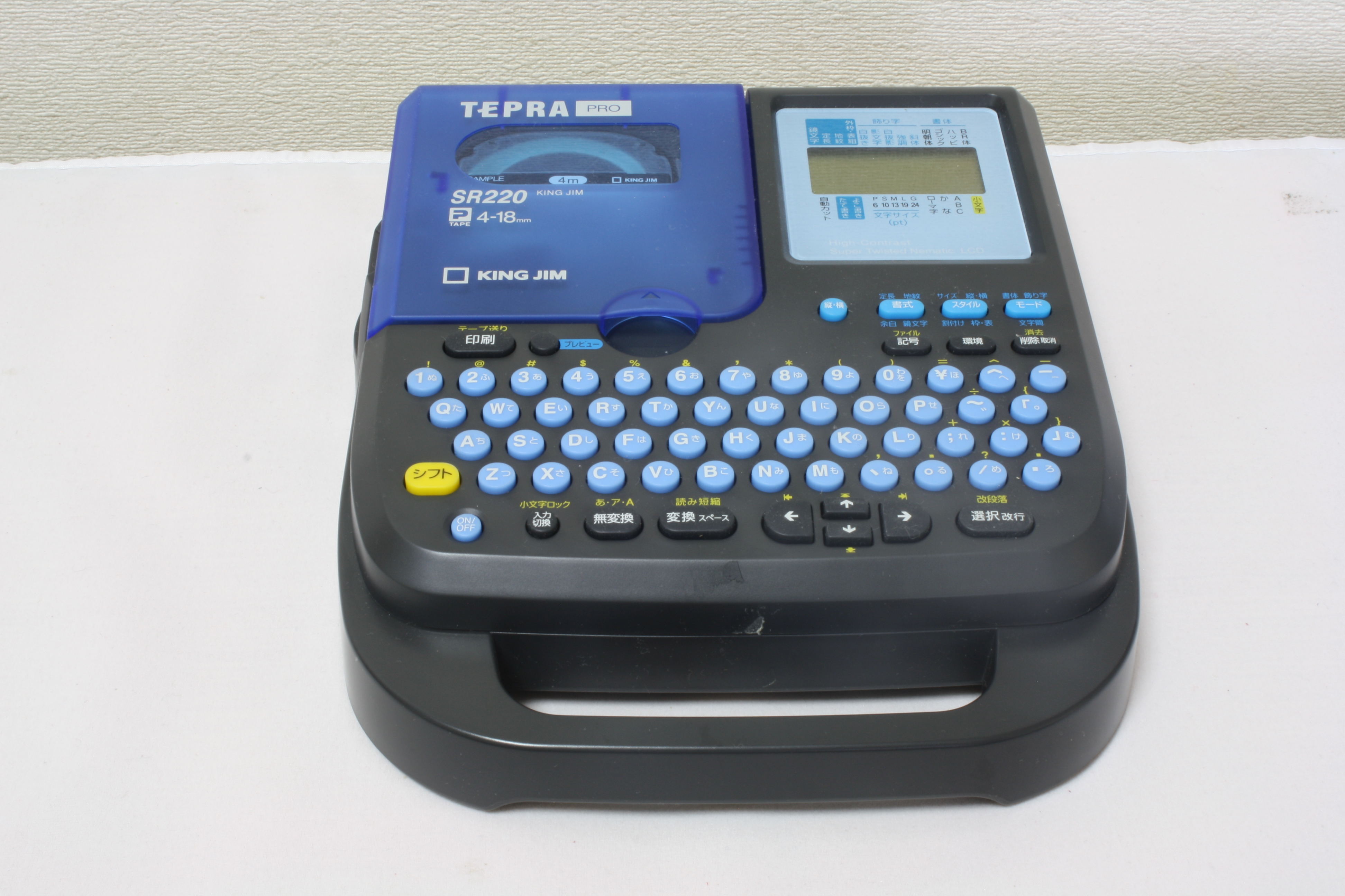 KINGJIM テプラ SR220